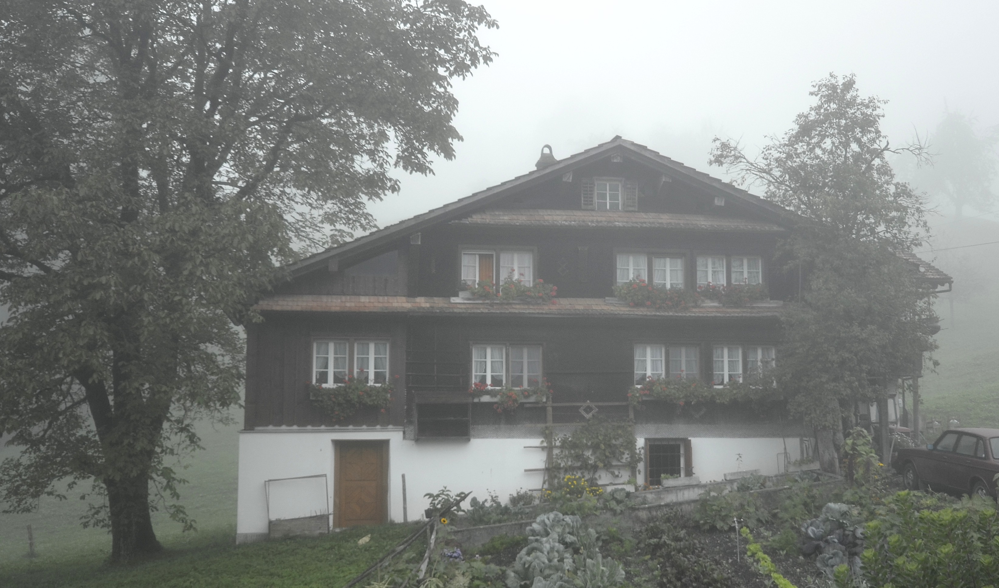 Haus23, Muotathal, ID 04.037